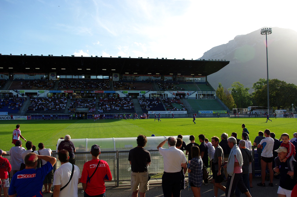 Tribune Honneur - Jean Liénard du Stade Lesdiguières